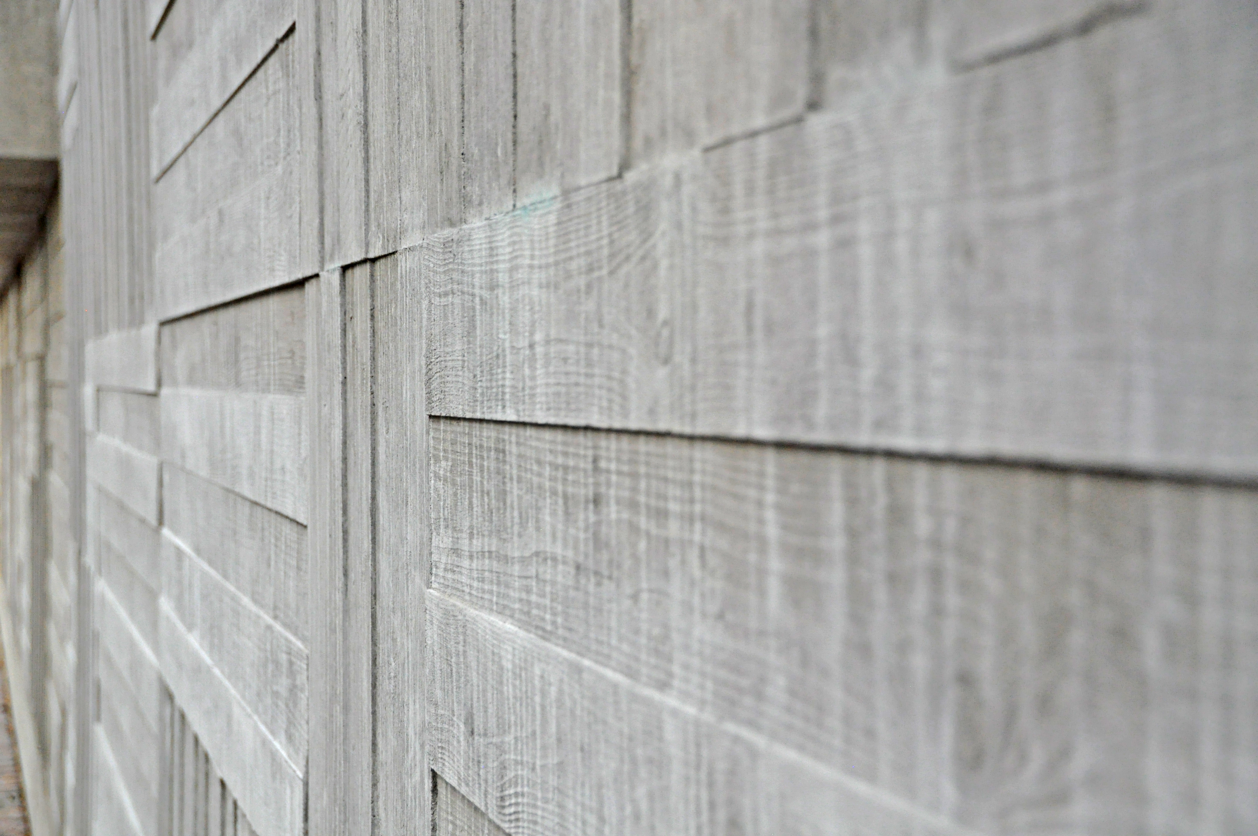 Yksityiskohta Sibelius-museon seinien kuvioista